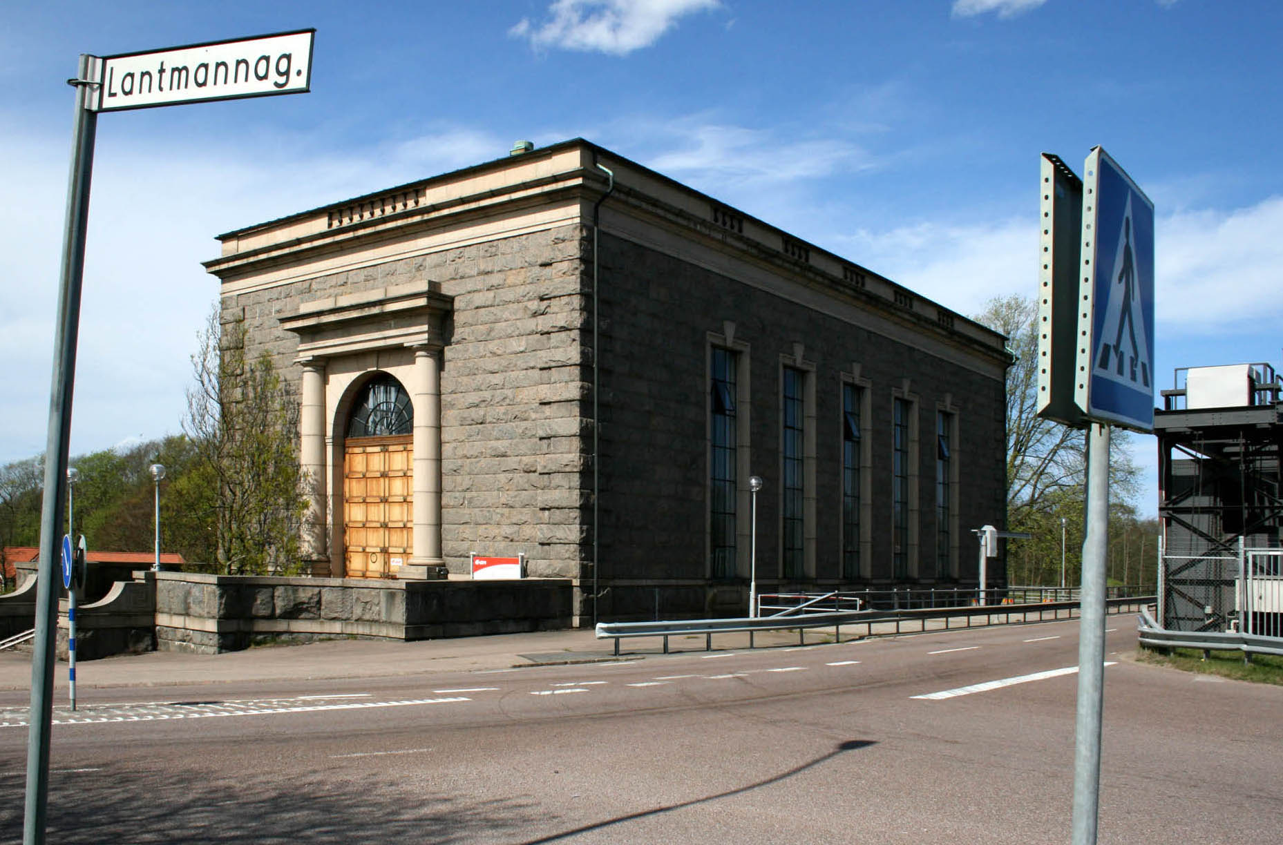 Laholms kraftverk